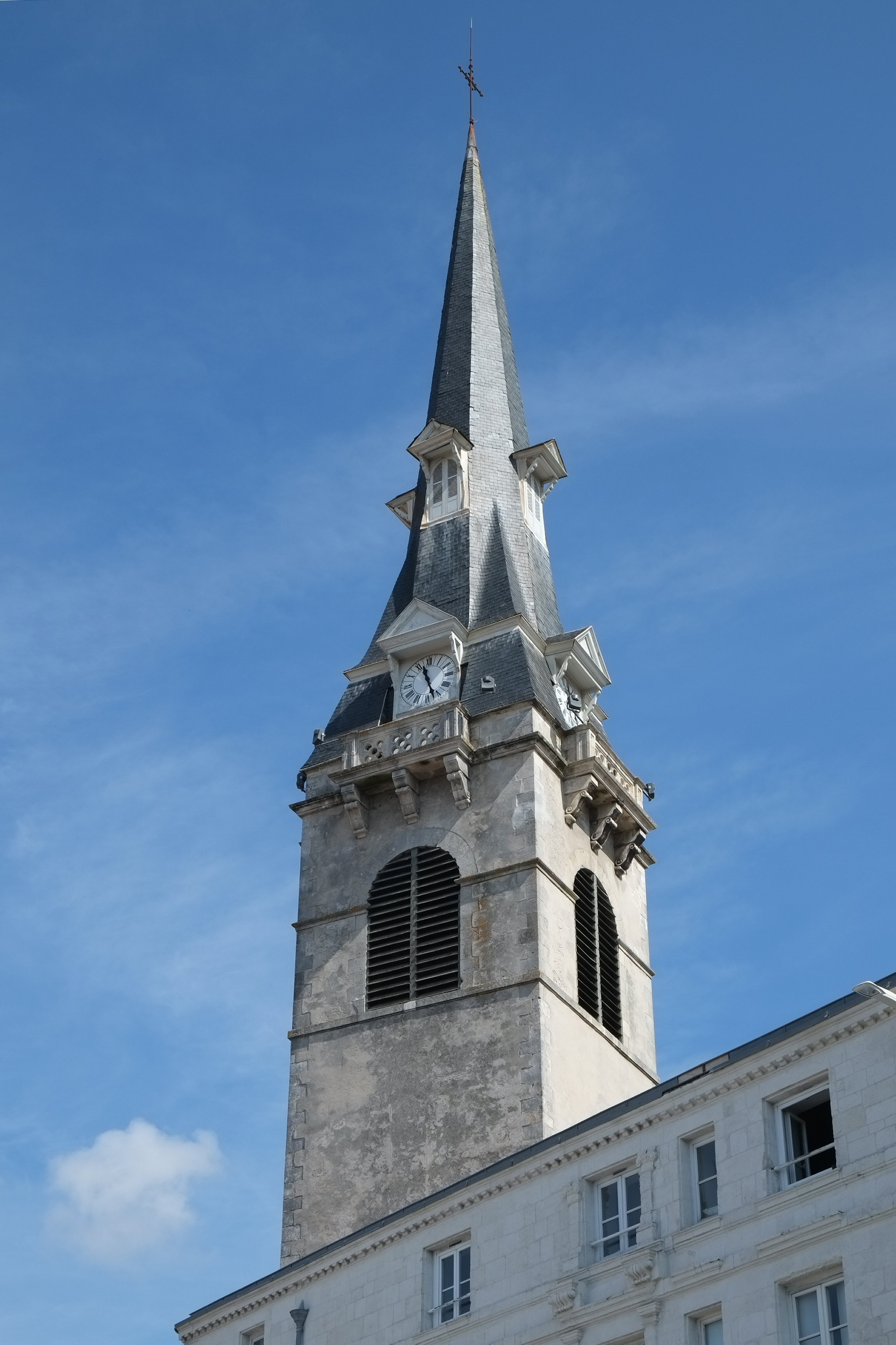 Clocher de l'église Notre-Dame-de Cougnes La Rochelle Charente-Maritime France